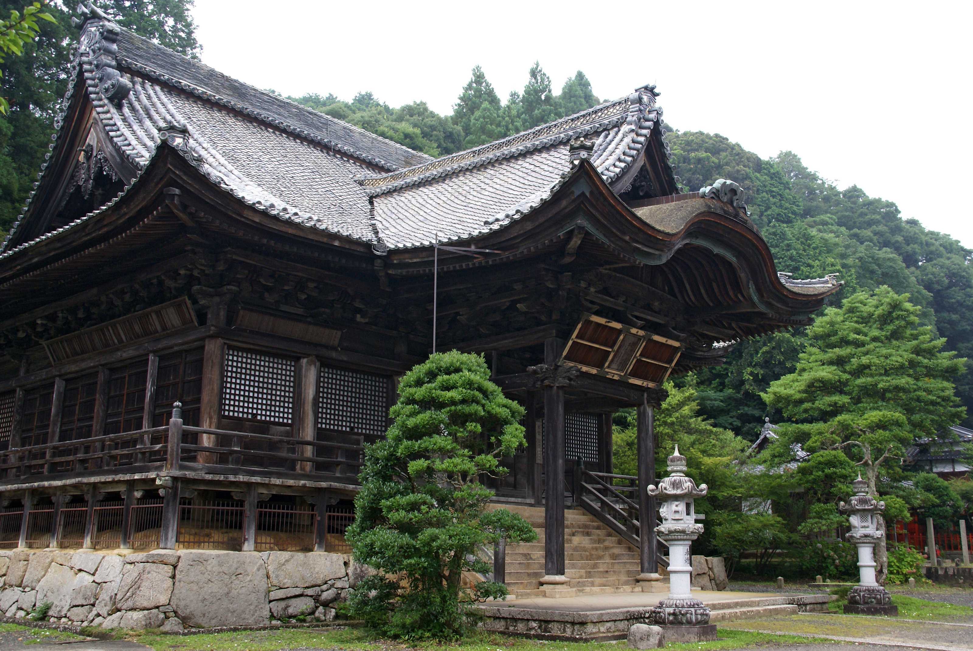 Enryuji in Maizuru, Kyoto prefecture, Japan